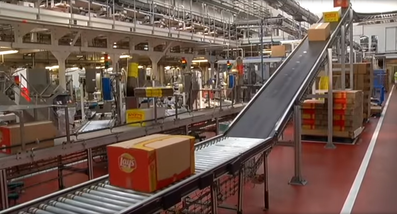 Visita a la fábrica de Pepsico Iberia